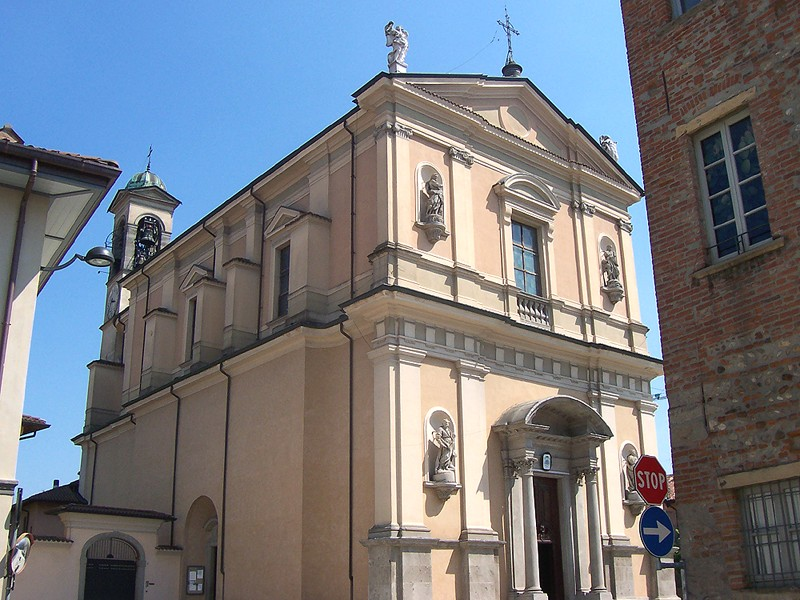 Arcene - Chiesa Parrocchiale di S. Michele